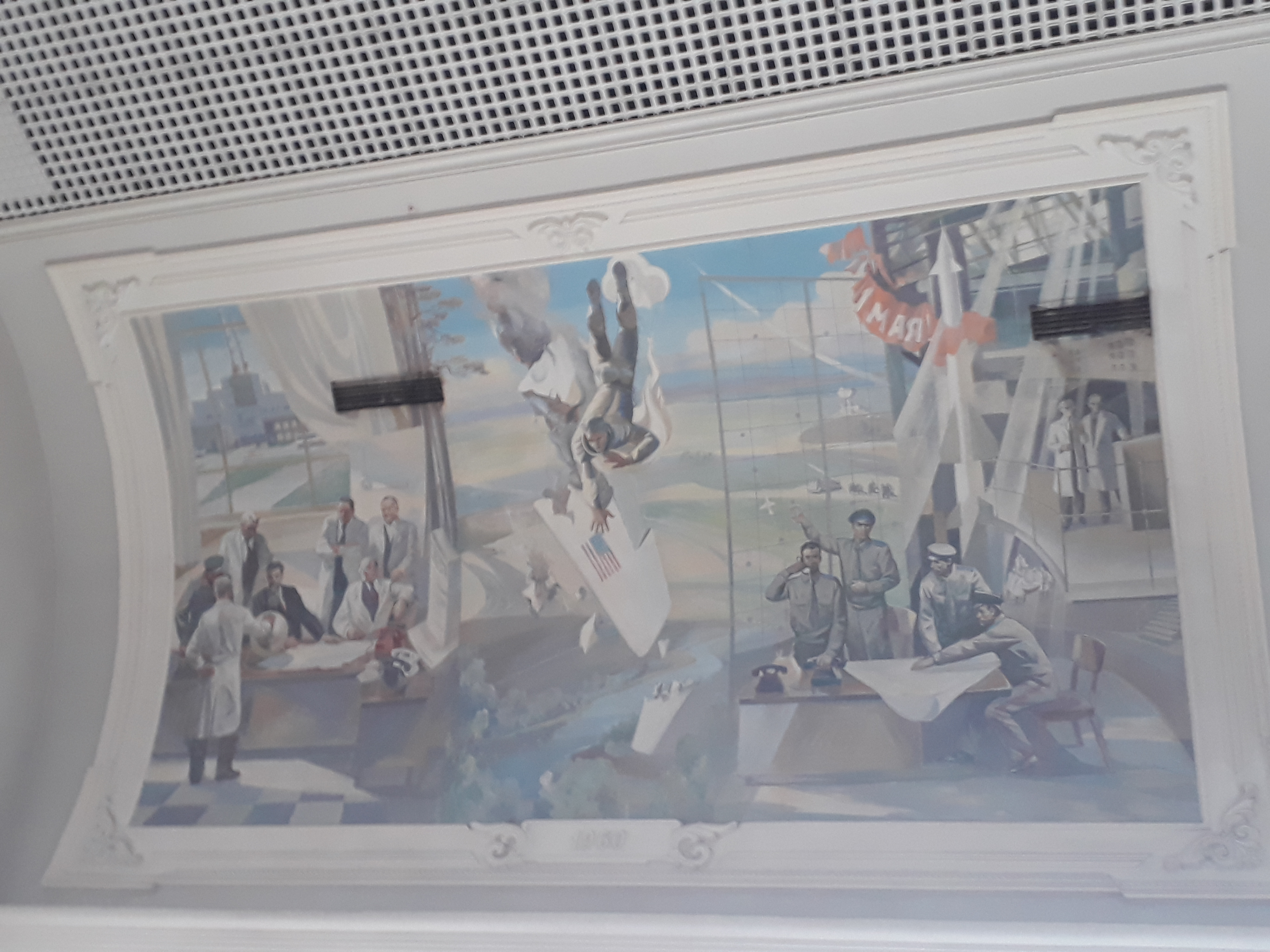 Февраль 2019